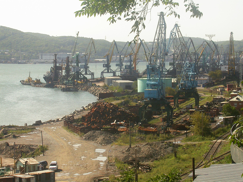 Nakhodka, Autumn, 2003